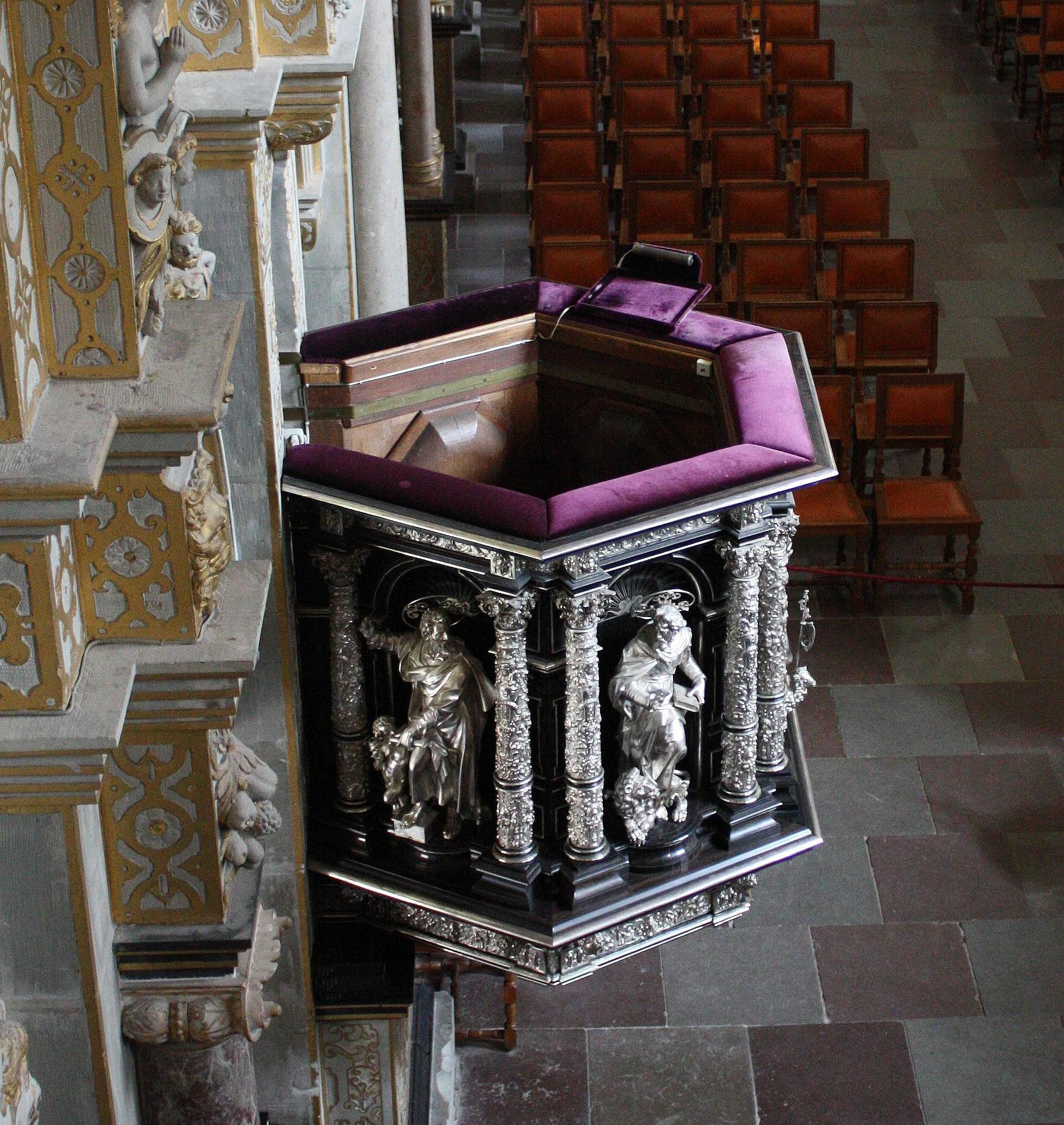 August 2009